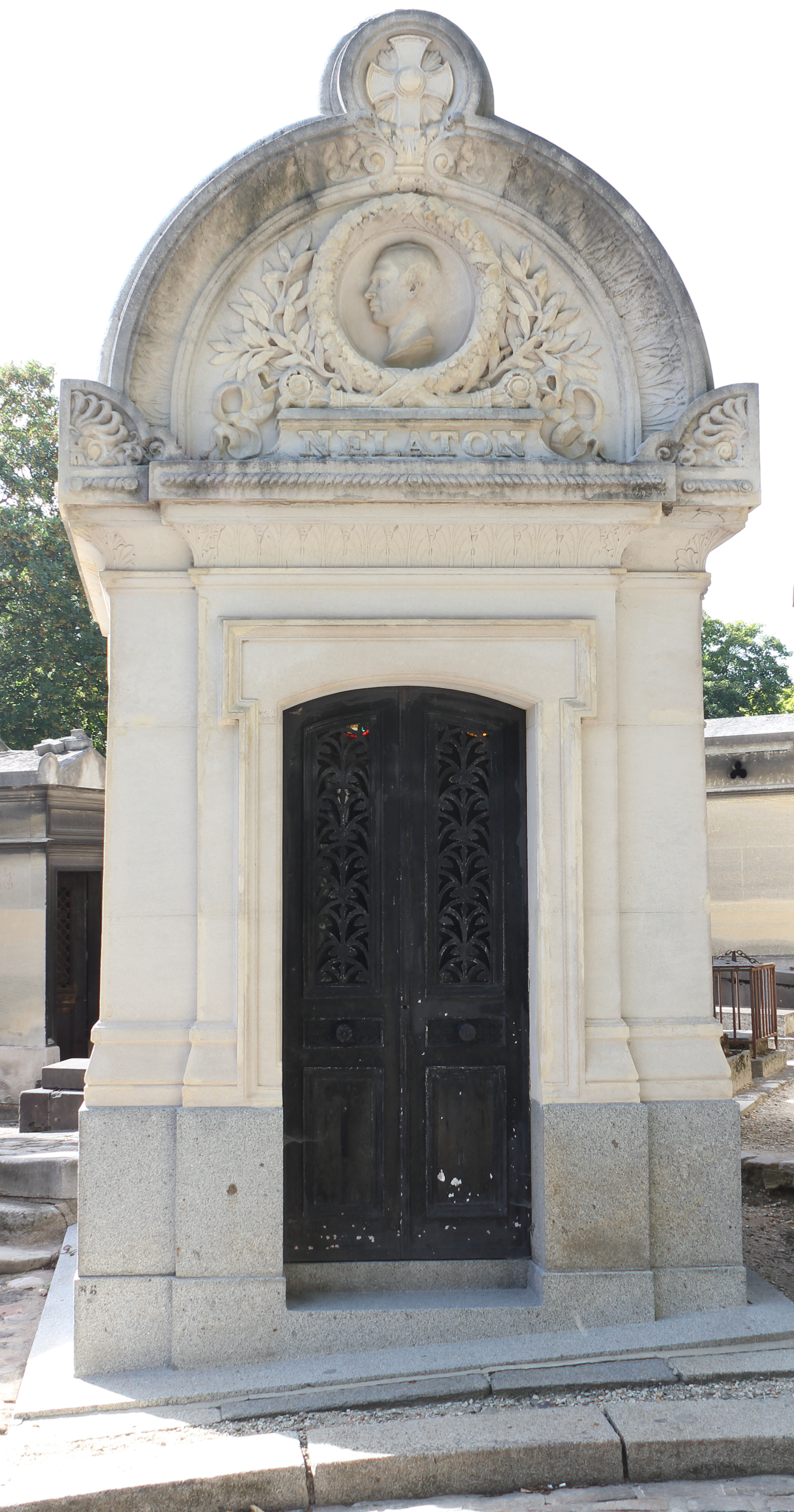 Sépulture des chirurgiens Auguste Nélaton (1807-1873) et son fils Charles Nélaton (1851-1911).